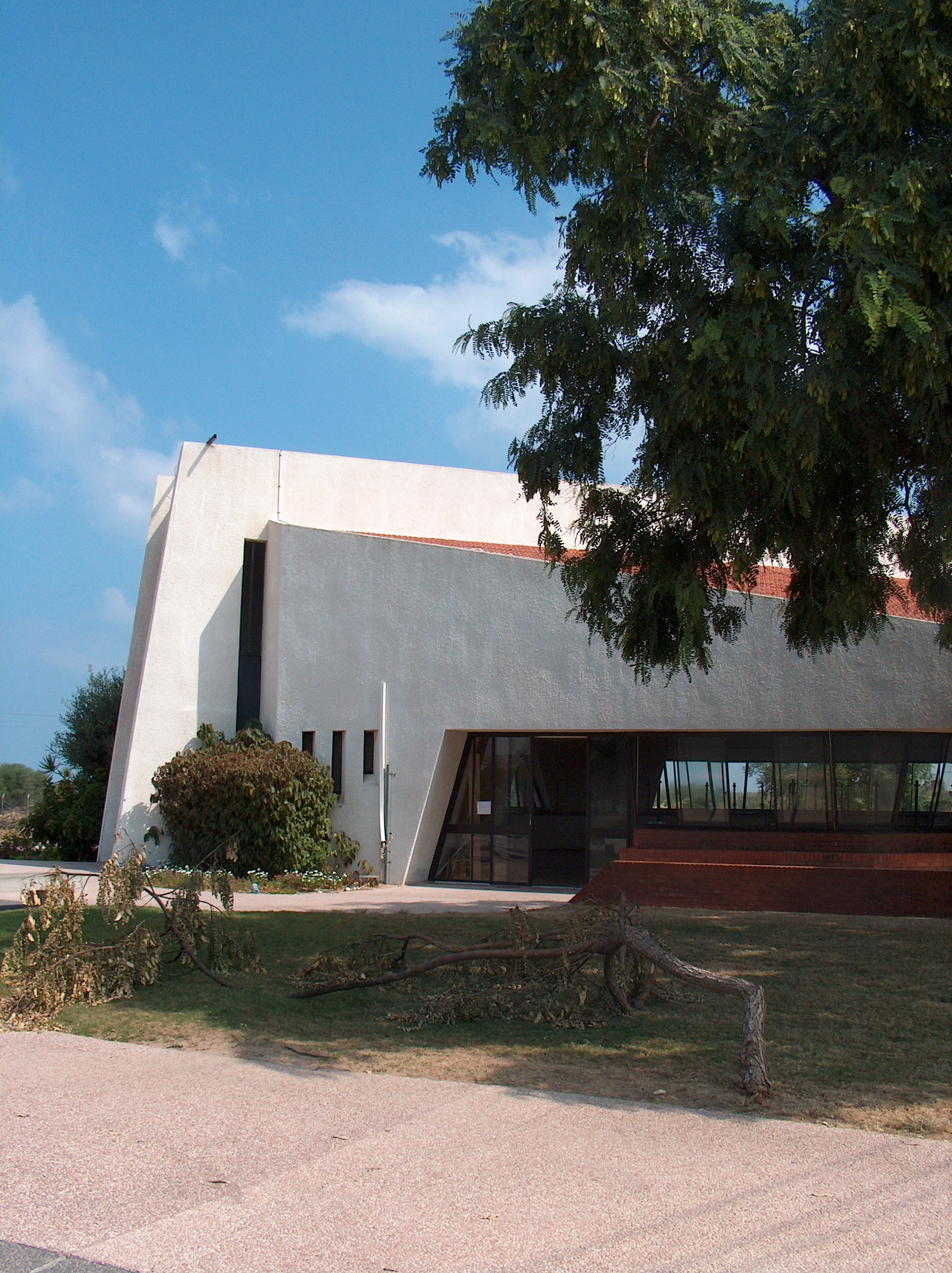 בית הכנסת ביישוב he:גני טל לאחר פינויו (אדריכלים: זלצמן-דויטש).